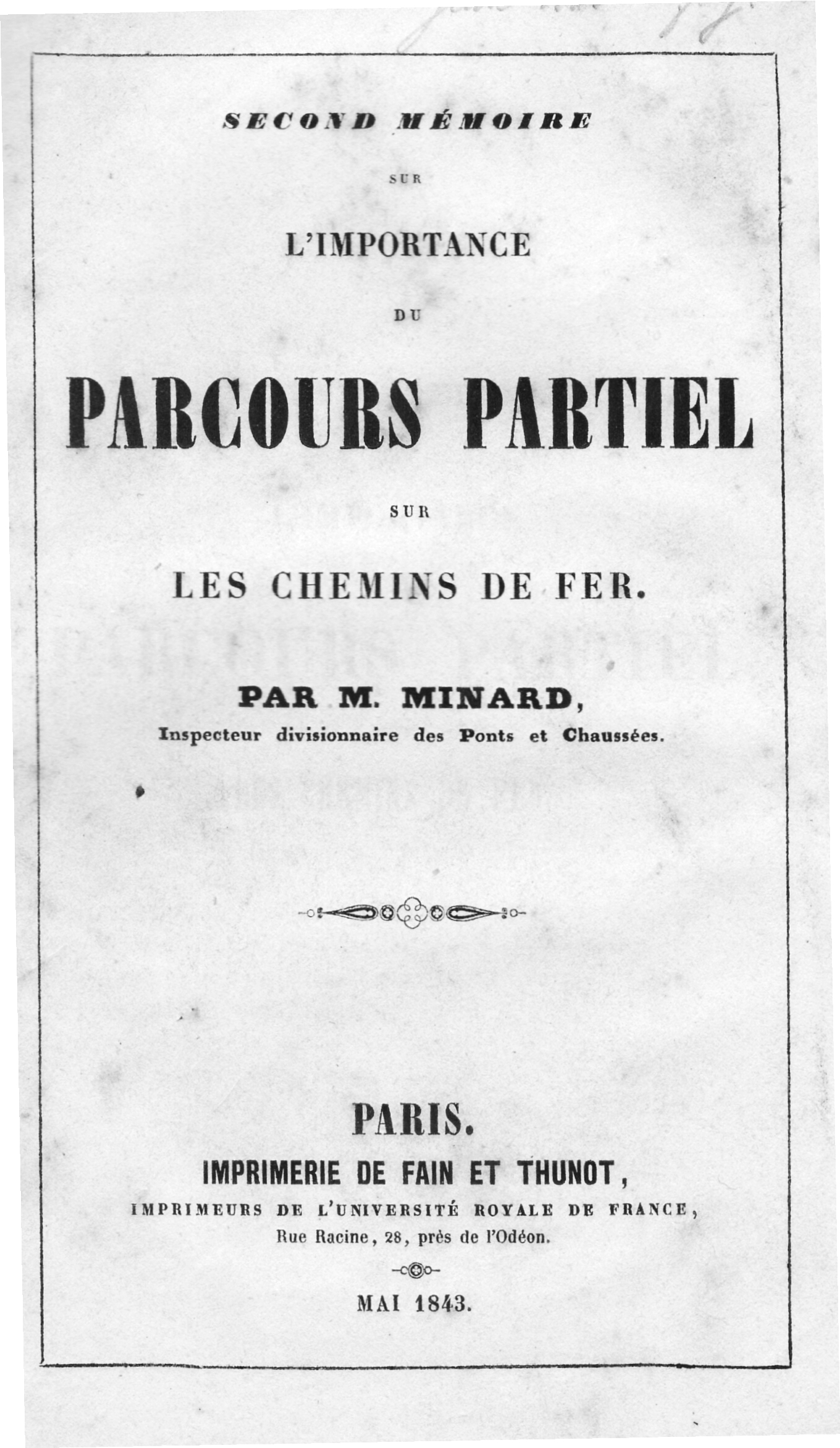 Mémoire de Minard sur l'importance des parcours partiels sur les chemins de fer.